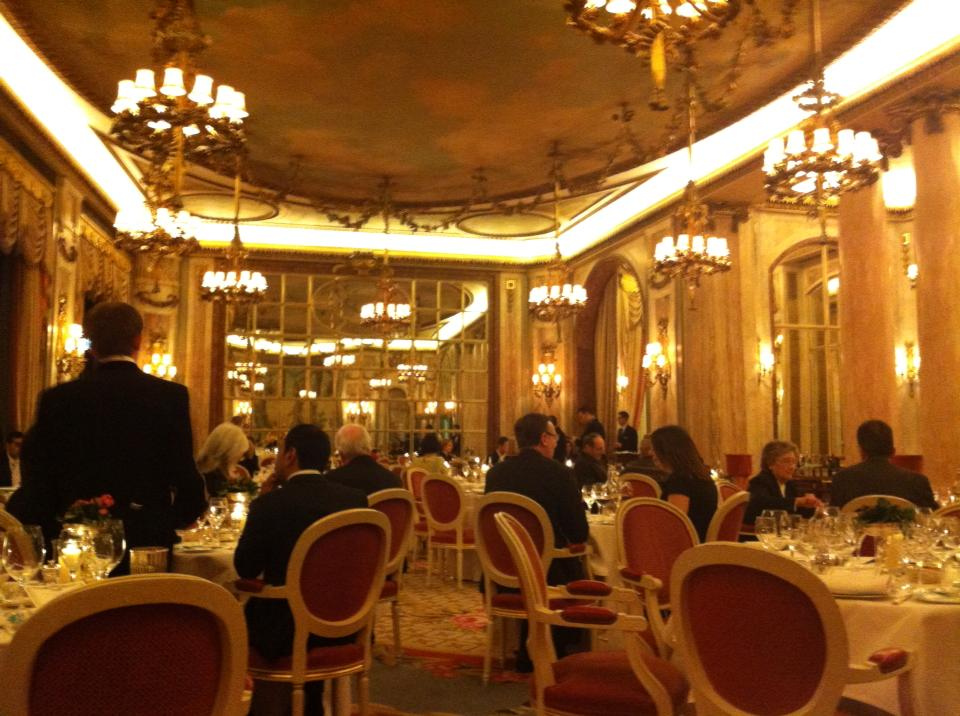 The Ritz Restaurant London